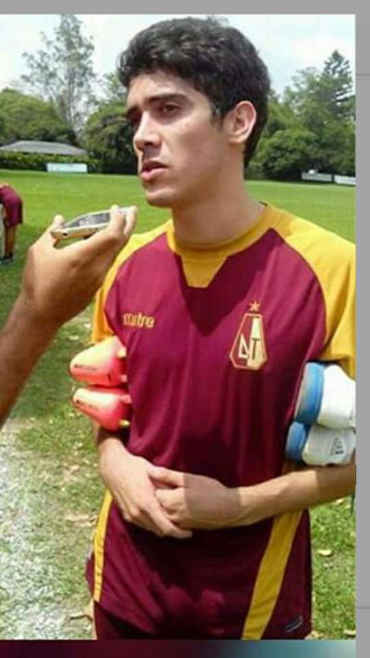 Leandro Schunke en su primera entrevista en el Deportes Tolima